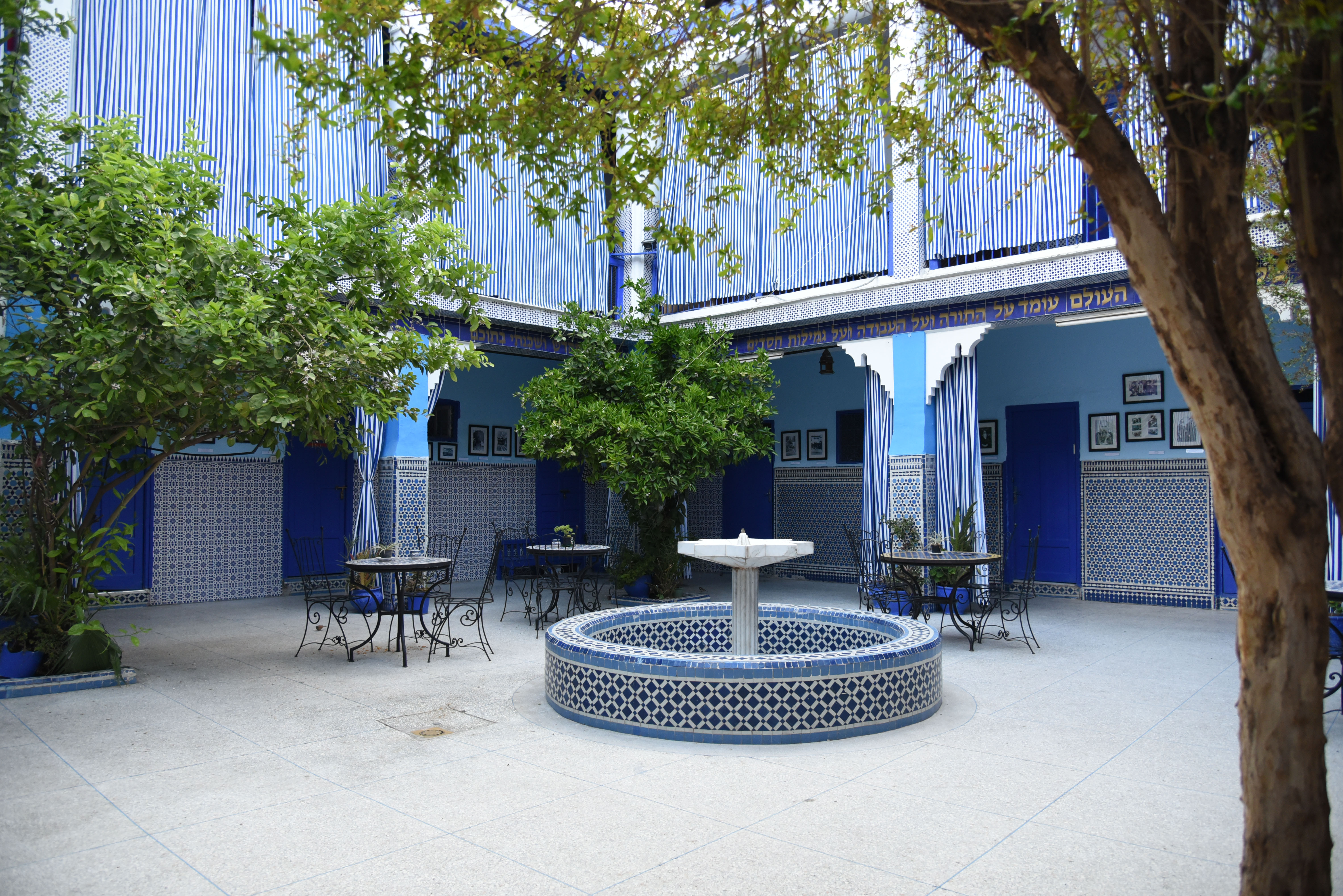 חצר בית הכנסת צלאת אל עזמה במלאח מרקש